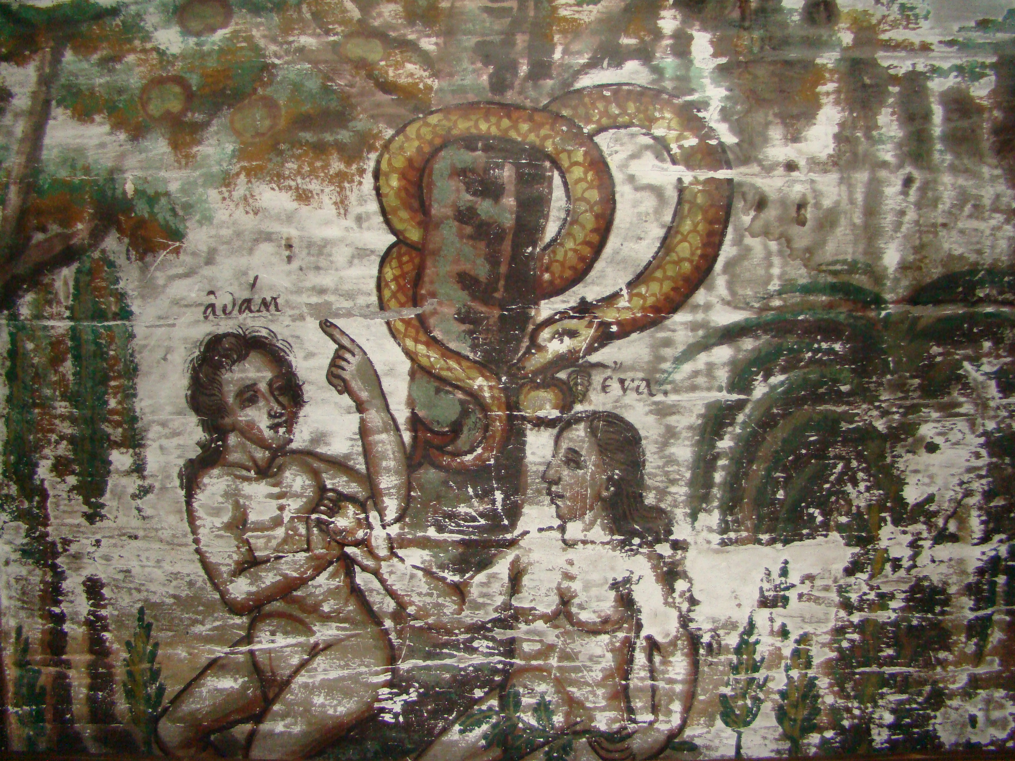 Biserica de lemn „Sf.Nicolae” din Căraci-Hunedoara